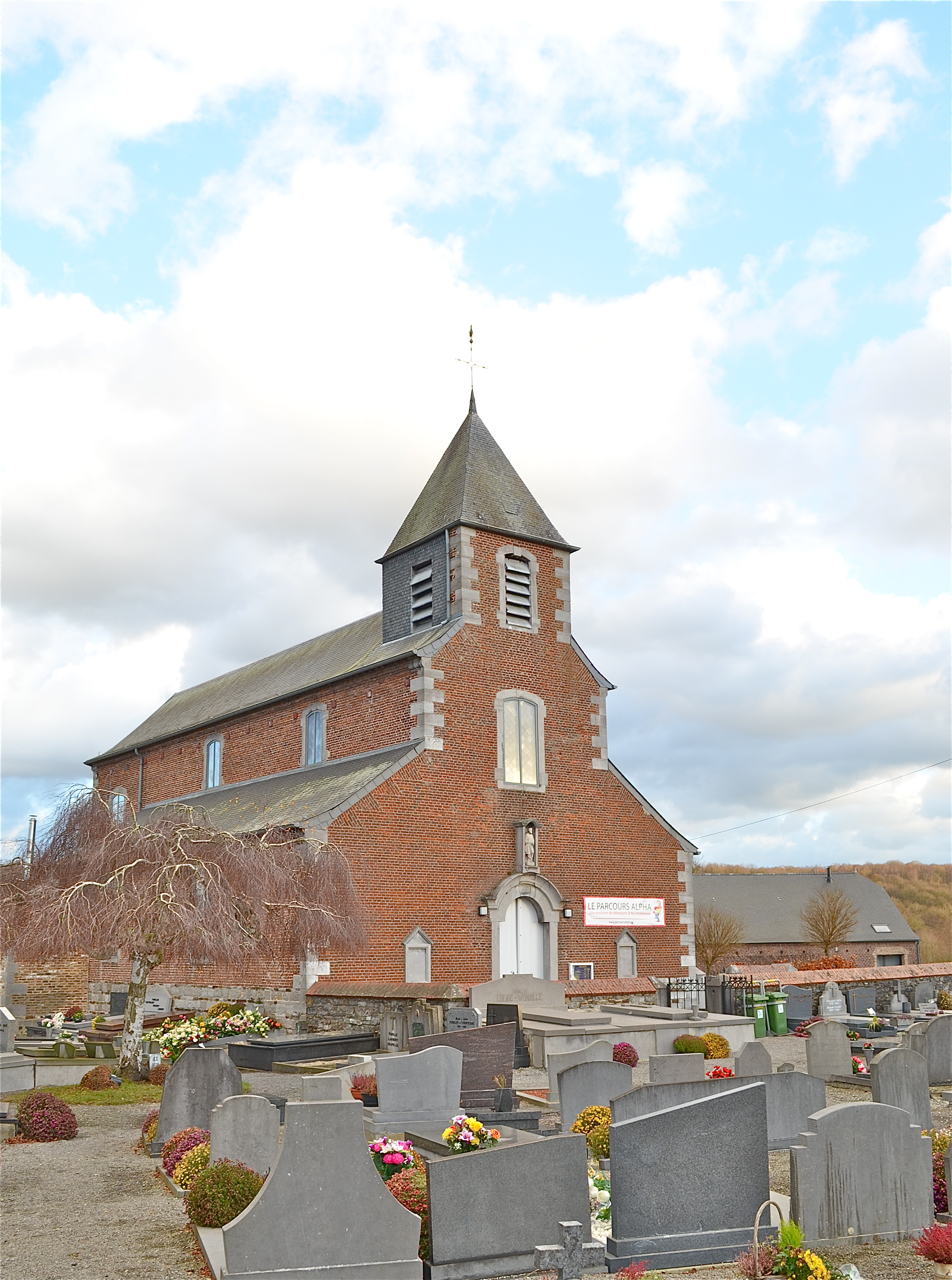 Vue générale de l'église.